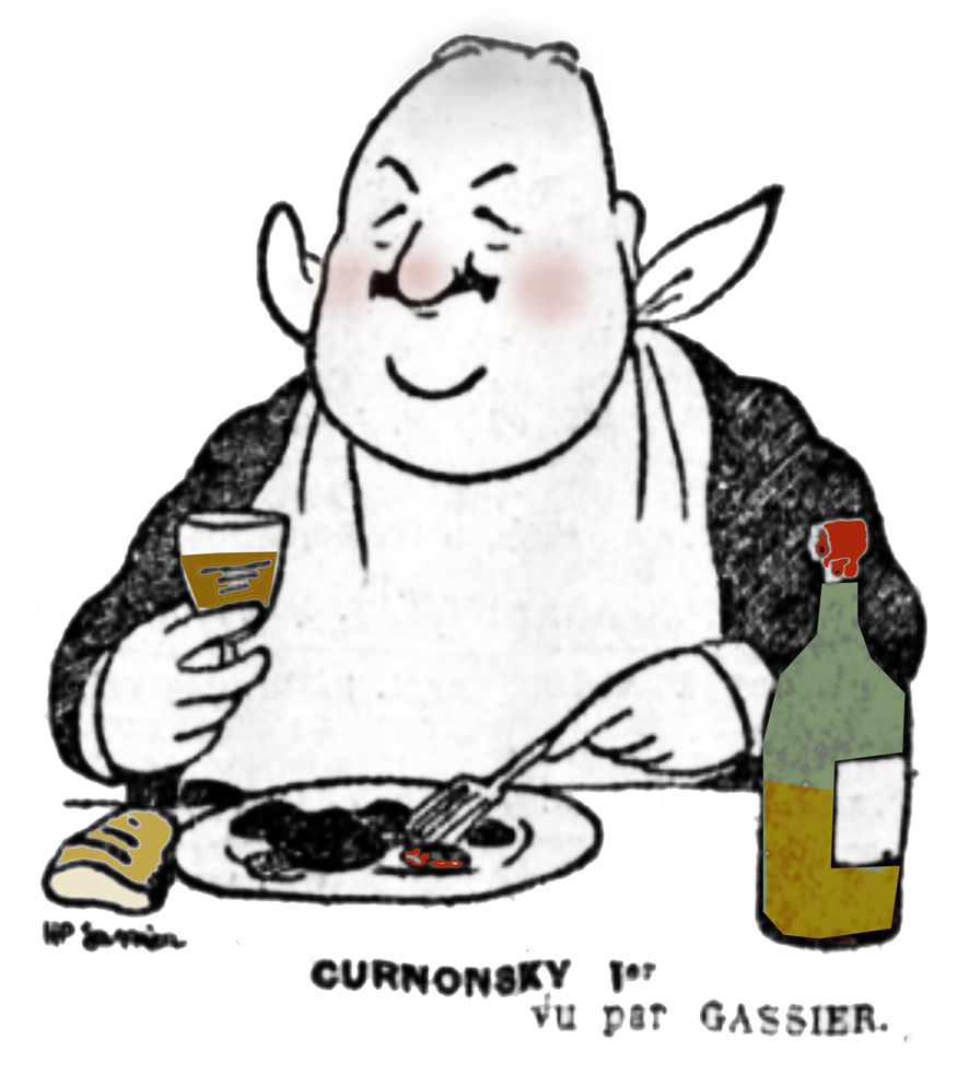 Curnonski par Gassier (1883-1951) dans Paris-Soir du 7 décembre 1927, en 1927, Cur est élu Prince des gastronomes, cette caricature illustre un article sur la création de l'Académie des Gastronomes